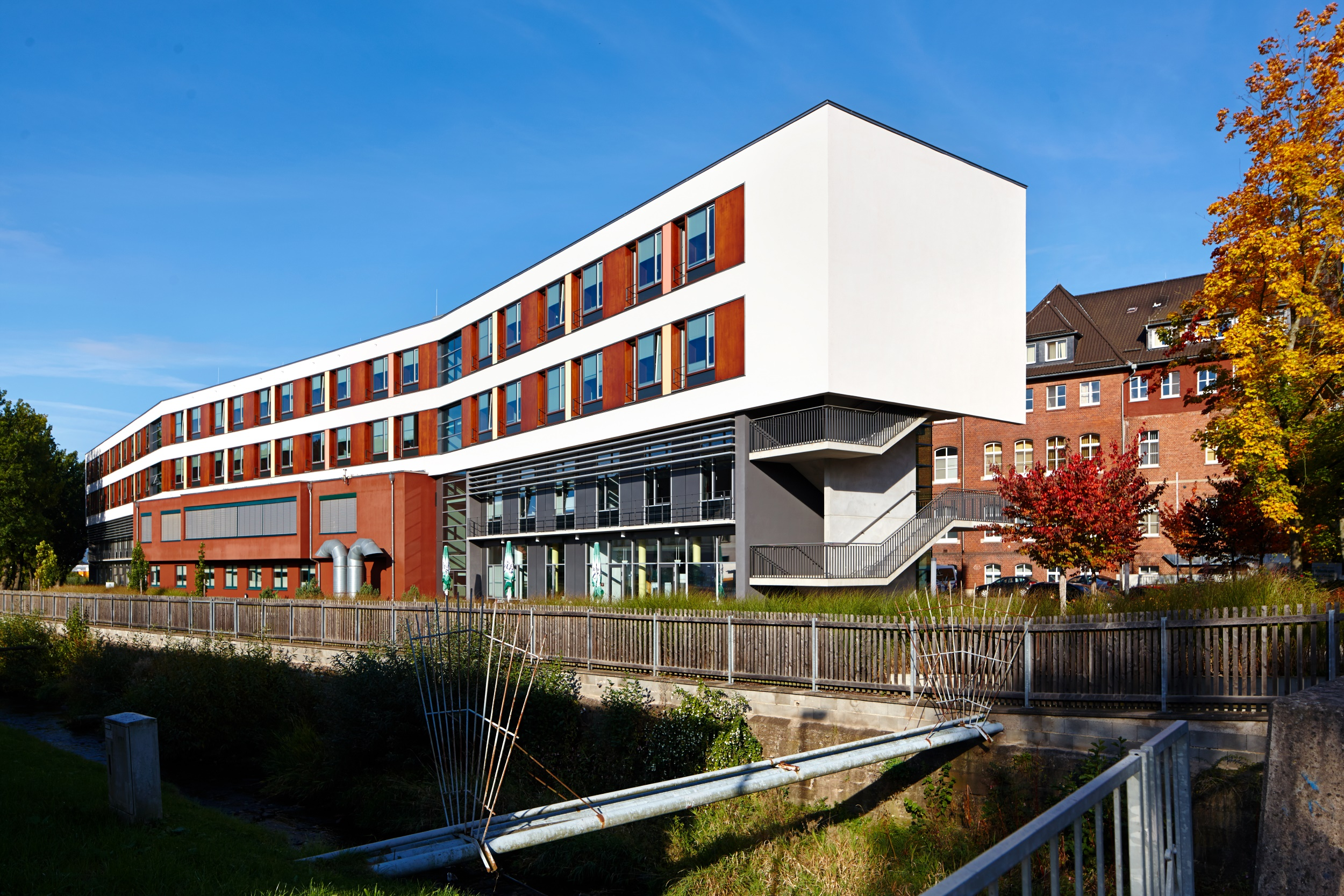 Bild des Elisabeth Klinikums Schmalkalden